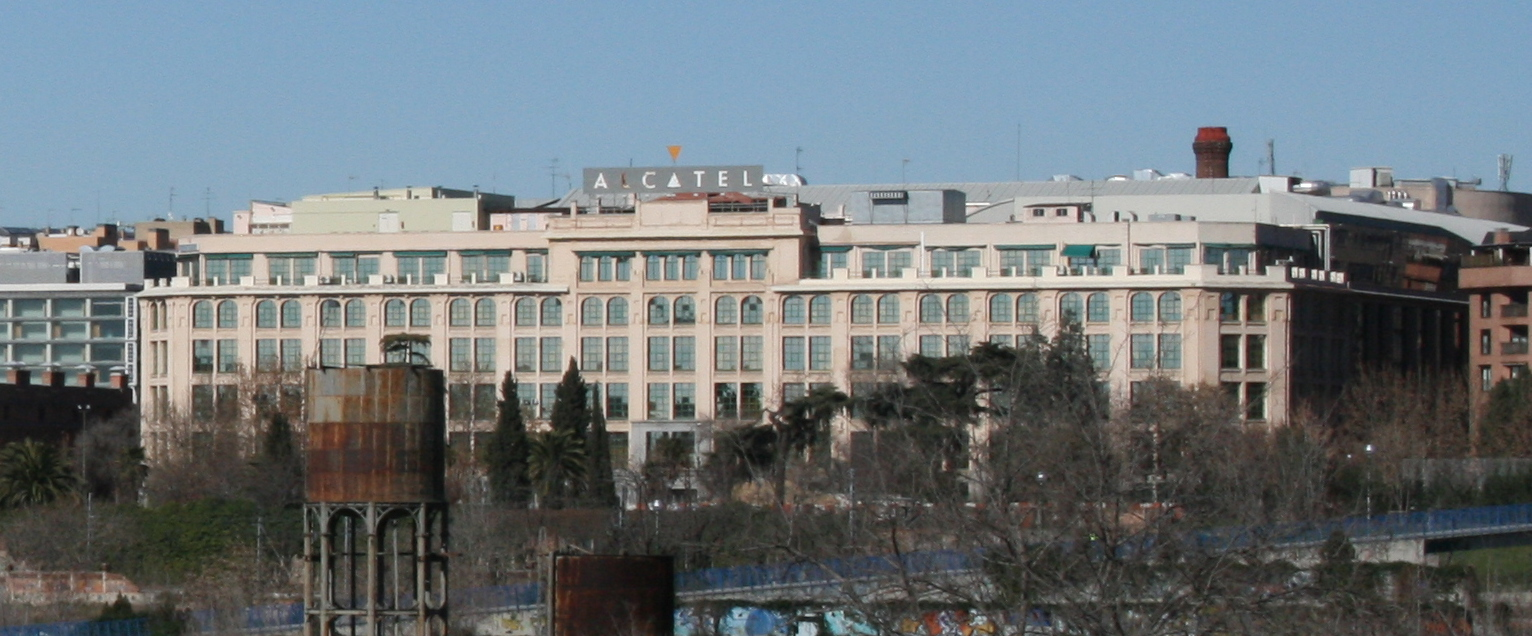 Vista del edificio de Alcatel (antigua fábrica de Standard Eléctrica) en 2007 desde el parque Enrique Tierno Galván. En la actualidad, el edificio ha sido parcialmente demolido